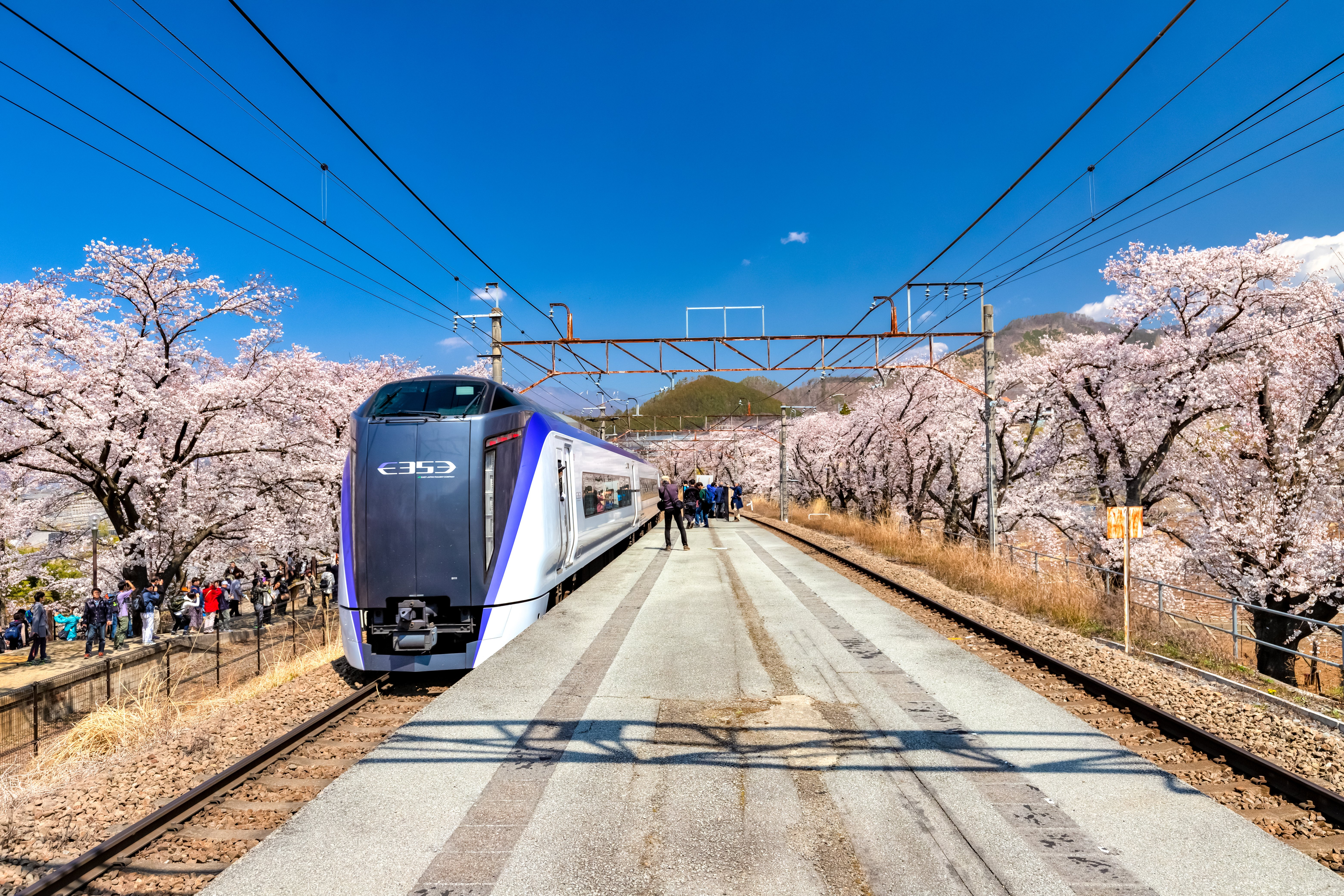 山梨県甲州市、勝沼ぶどう郷駅、桜、甚六桜、かいじ